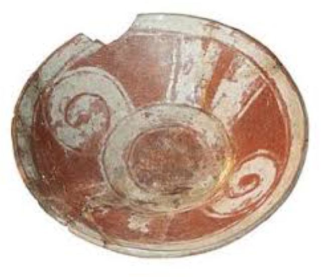 Pequeño vaso ceremonial pintado en blanco y rojo con diseños geométricos, (100 a.C. -600 d.C.�) Cerámica puertorriqueña perteneciente al grupo Saladoide. Se encontró en el sitio arqueológico Hacienda Grande de Loíza, Puerto Rico. 2" x 4" x 3 7/8"� Museo de Historia, Antropología y Arte, Universidad de Puerto Rico.